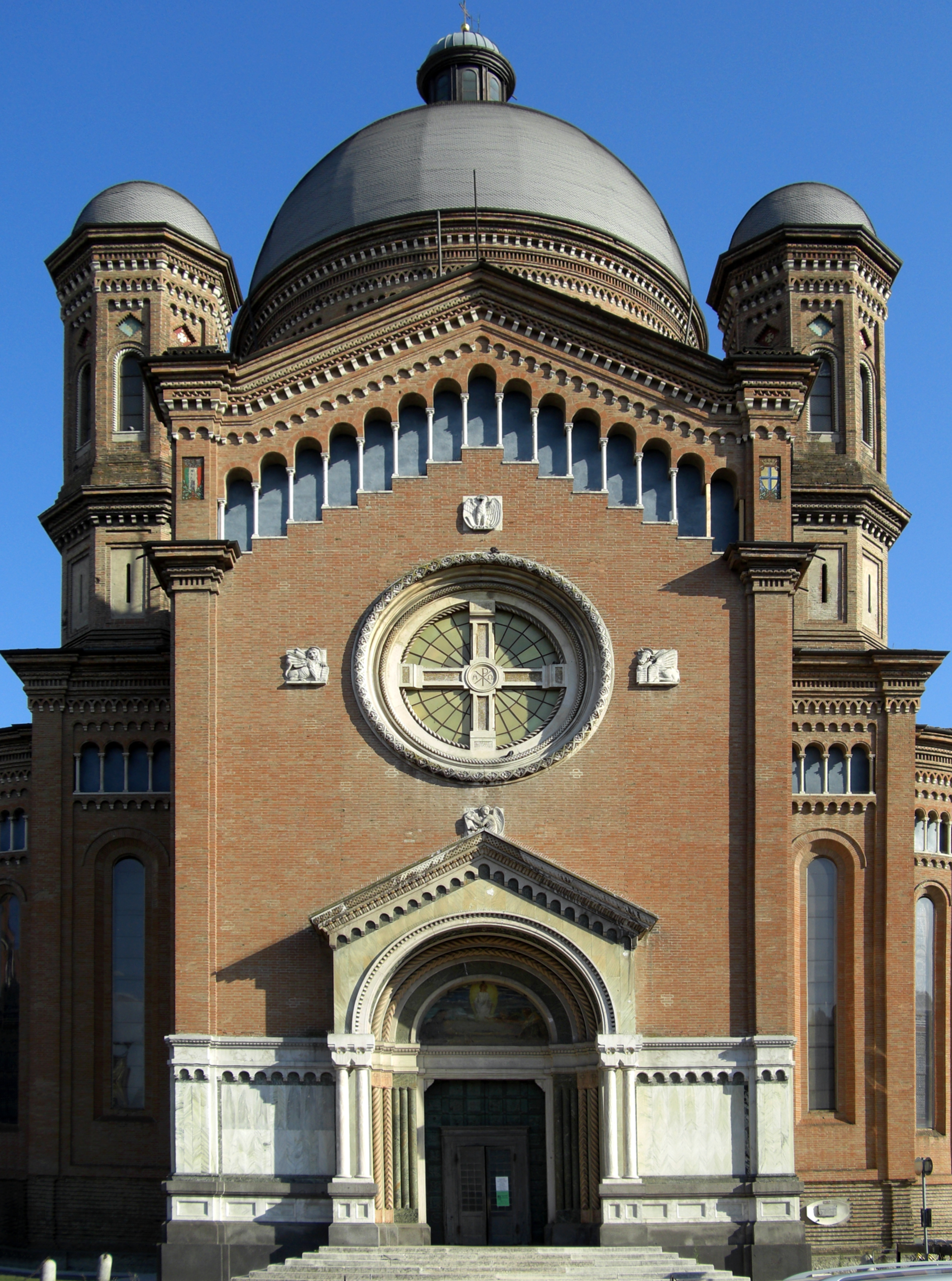 Tempio Monumentale This is a photo of a monument which is part of cultural heritage of Italy.